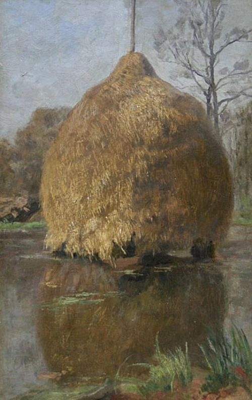 Marie Elisabeth Moritz: Heuschober im Winter, Pastell auf Pappe. 45 × 67.5 cm (17.7 × 26.6 in)